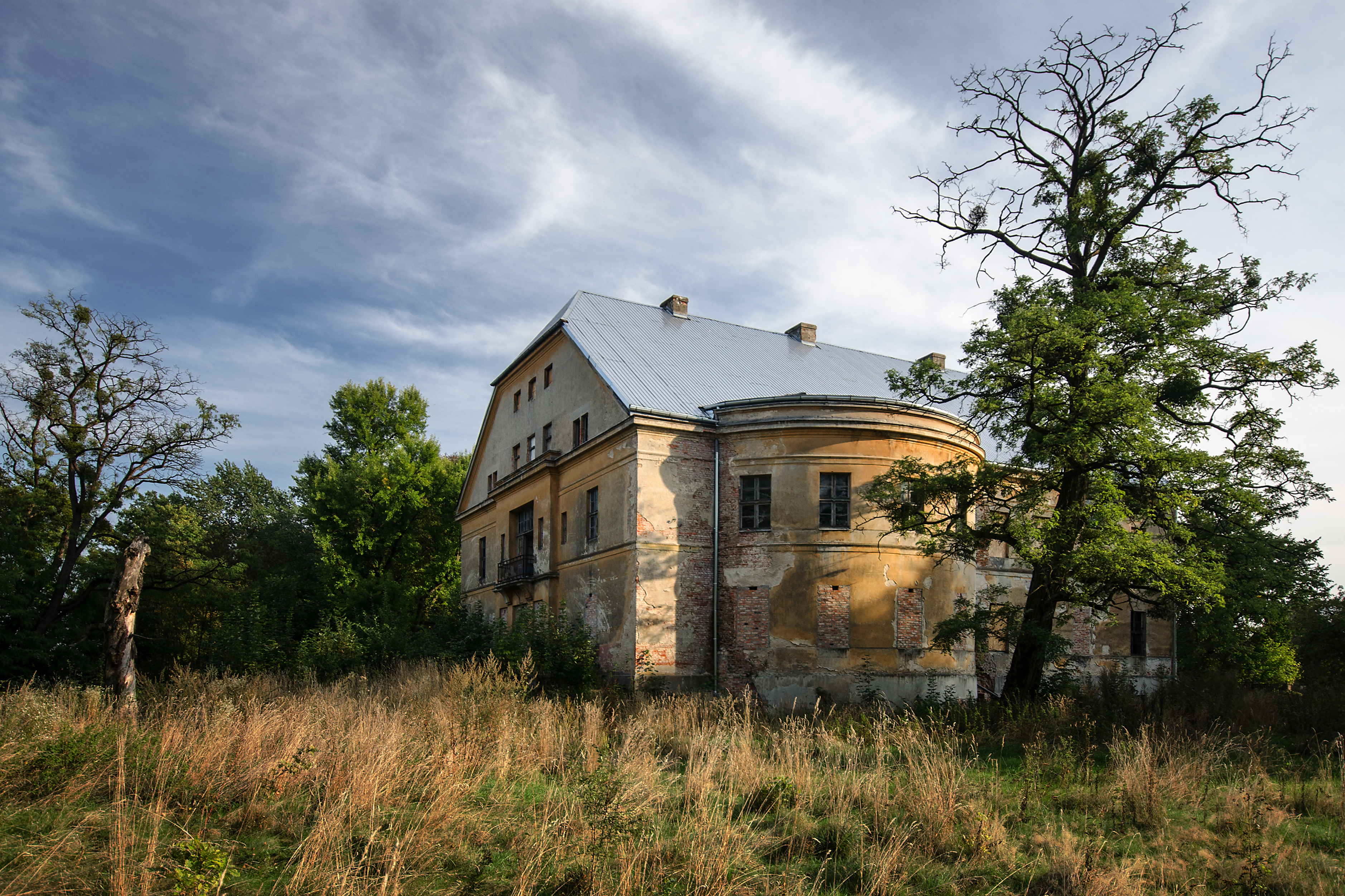 Zębowice, pałac, XVIII/XIX